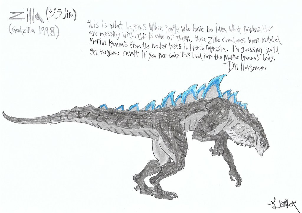 Зілла